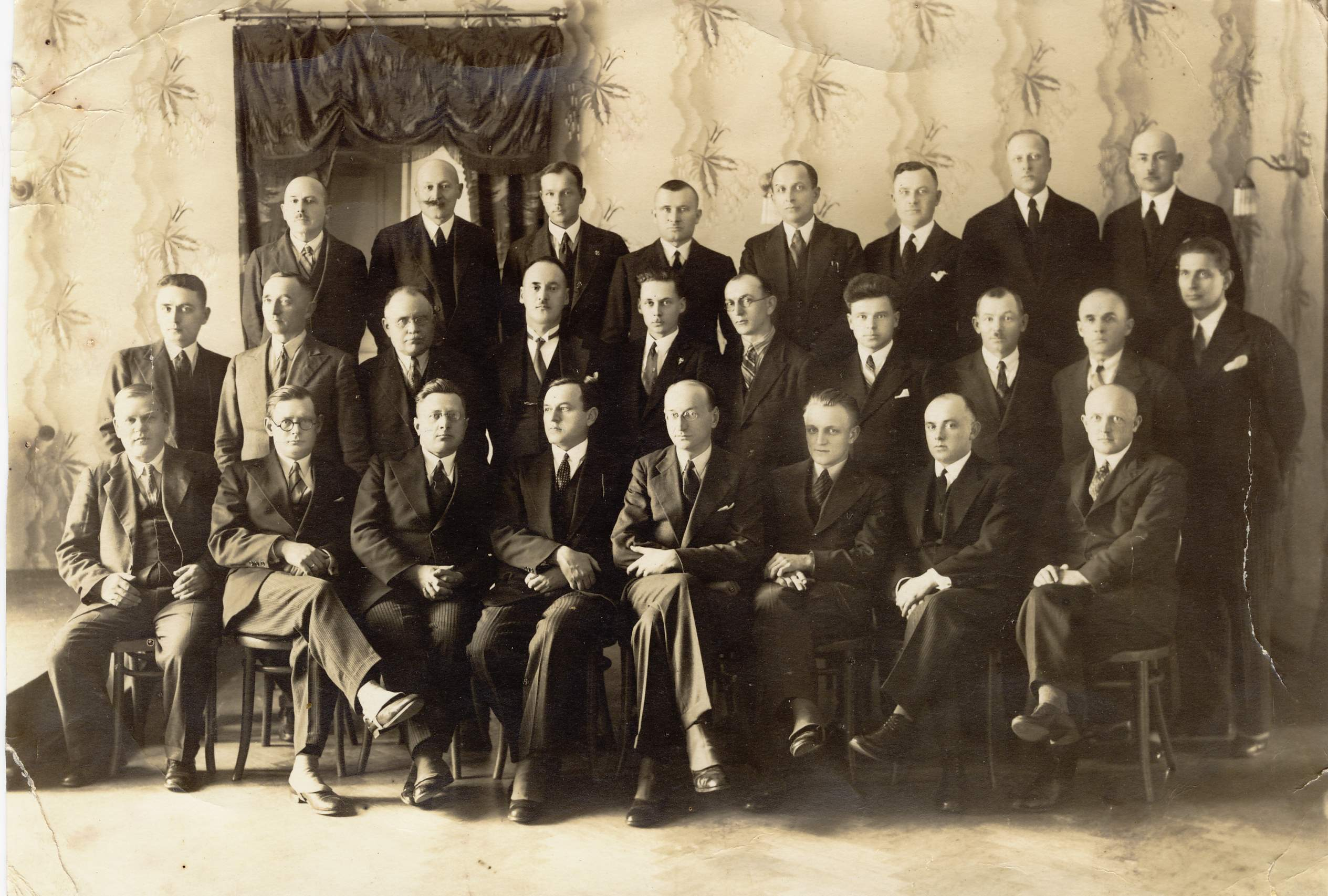 Grupa mierniczych pracujących w Urzędzie Wojewódzkim w Łucku. Od lewej od dołu w pierwszym rzędzie siedzi ósmy inż. Wincenty Nawrocki, w drugim rzędzie stoi piąty Zygmunt Wierzyński, w trzecim rzędzie stoi pierwszy mierniczy przysięgły Leopold Kleofas Paszkowski. Zenon Paszkowski, Polacy z Kresów Wschodnich na Warmii i Mazurach - Leopold Kleofas Paszkowski